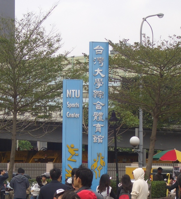 中文（台灣）: 第24屆台灣同人誌販售會與第15屆開拓動漫祭，國立臺灣大學綜合體育館館名立牌。